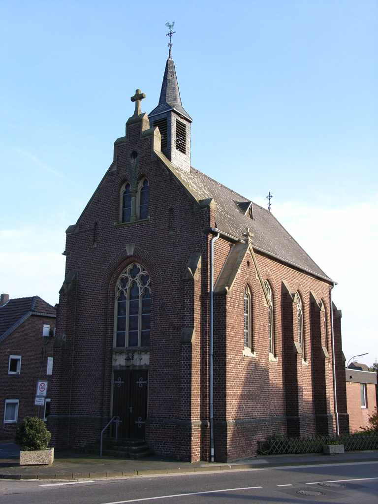 Brabara-Kapelle Wegberg-Uevekoven